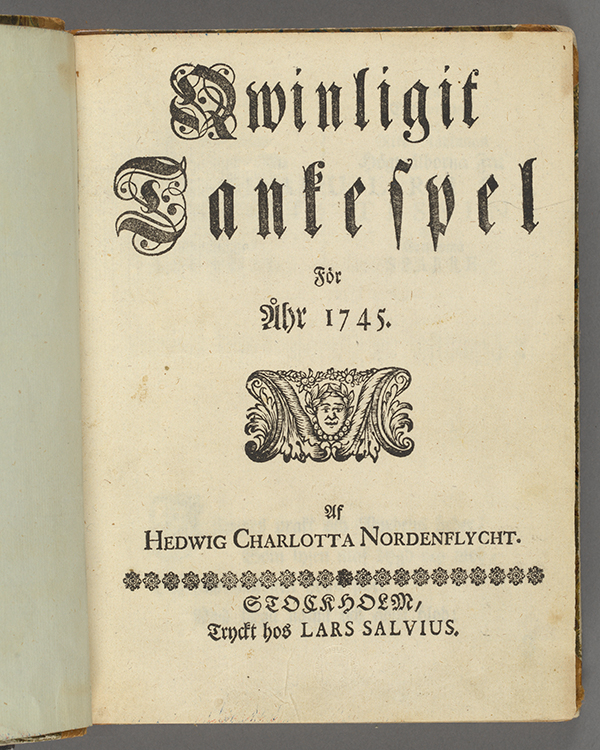 Qwinligit_tankespel, title page